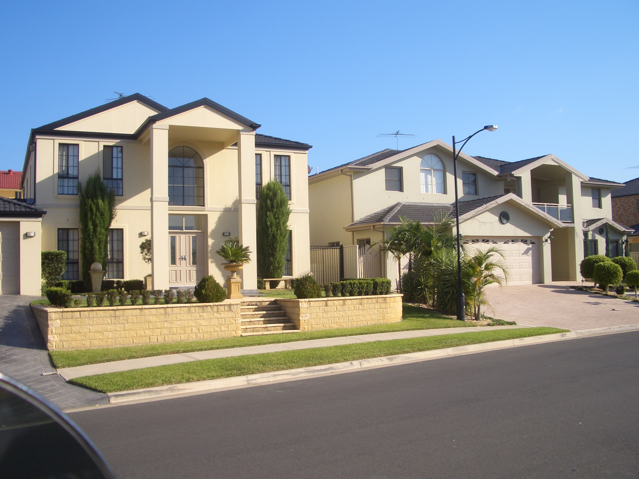 Voyager Point